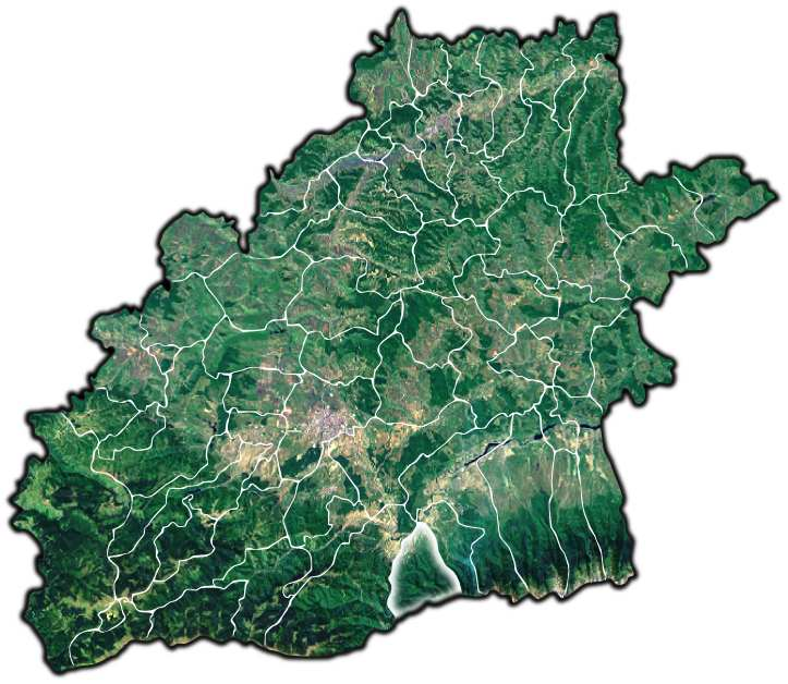 Turnu Rosu jud Sibiu.